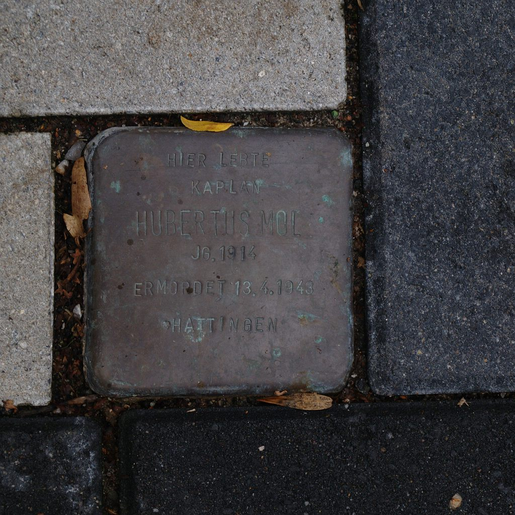 Stolperstein in Hattingen Kaplan Hubertus Mol